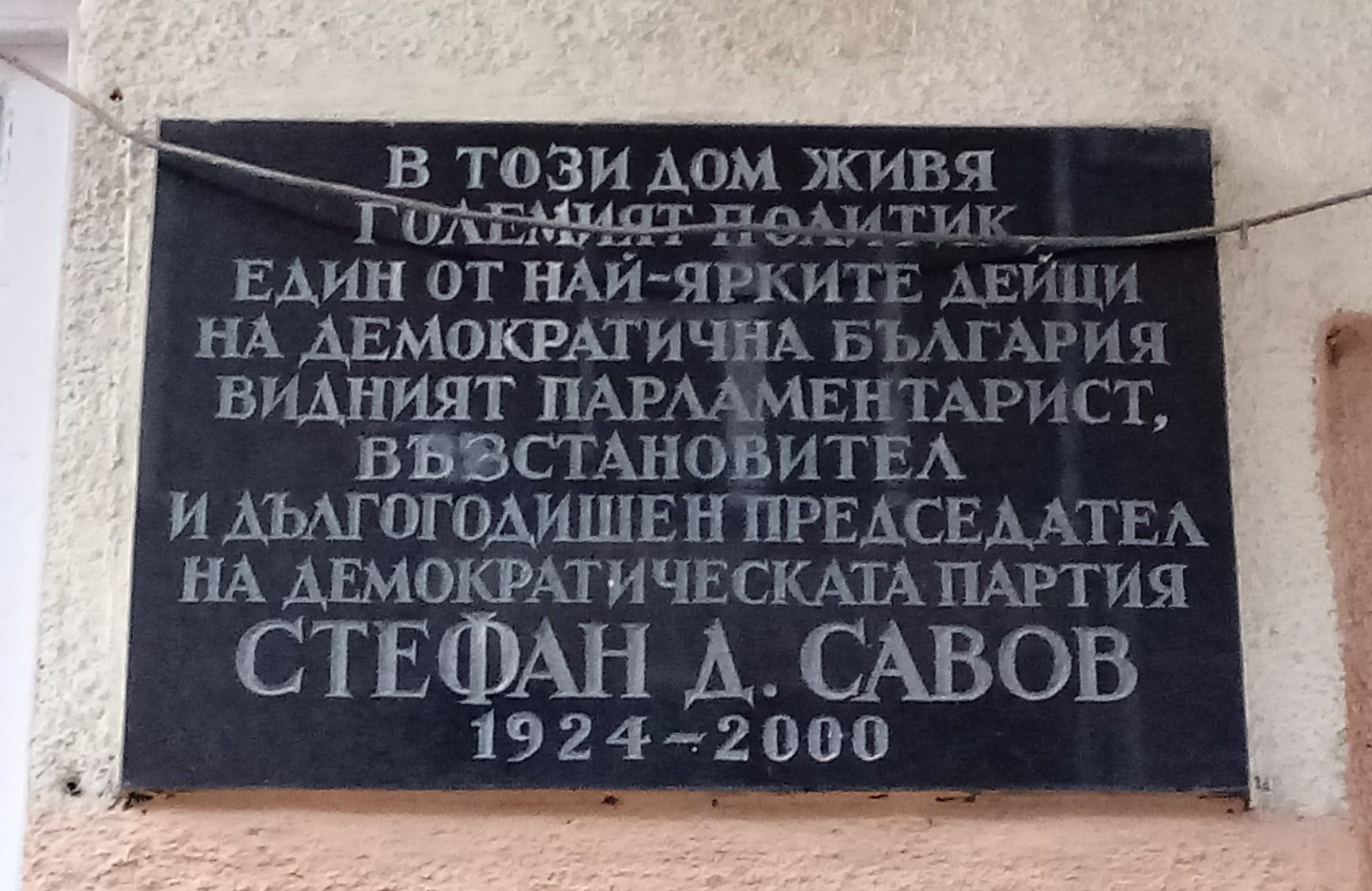 Stefan Savov memorial plaque, 39 Parensov Str., Sofia